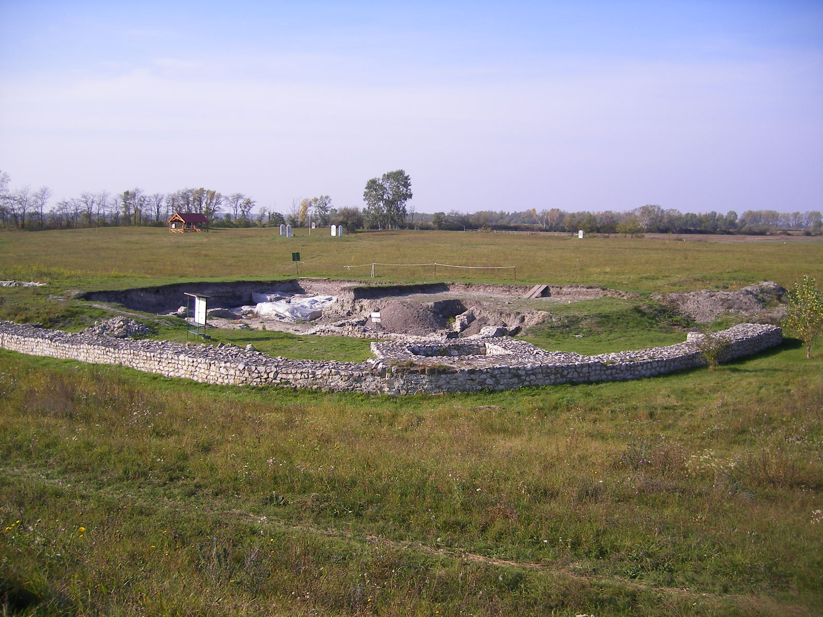 Izsa - Celemantia római tábor látképe a Duna töltéséről